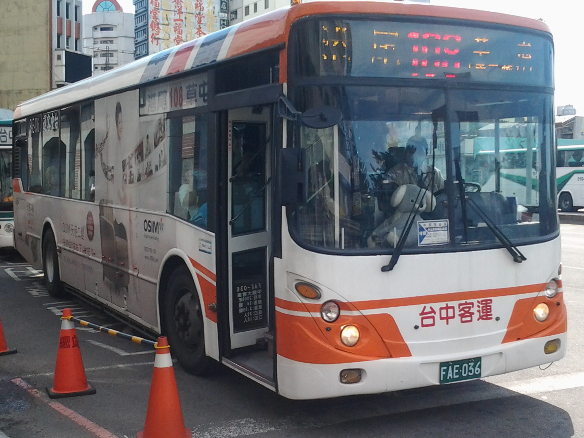 2006〈2006〉 HINO ERK1JRL（馨盛）